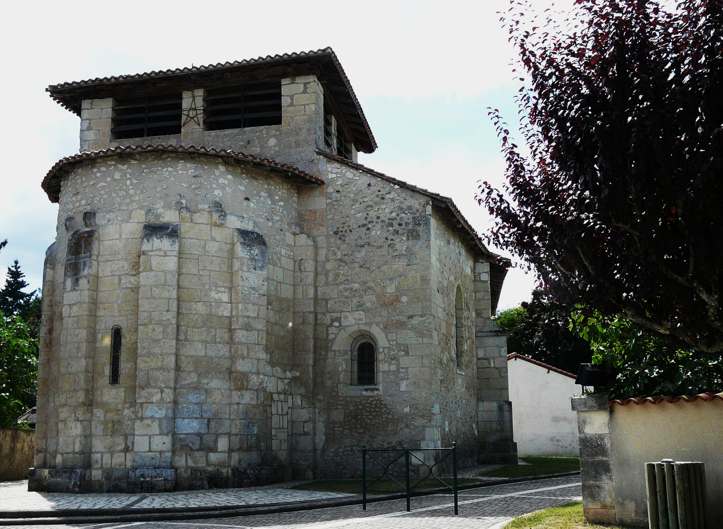 Église Notre-Dame de la Visitation à Segonzac (Dordogne) Object location45° 12′ 20.1″ N, 0° 26′ 47.6″ E